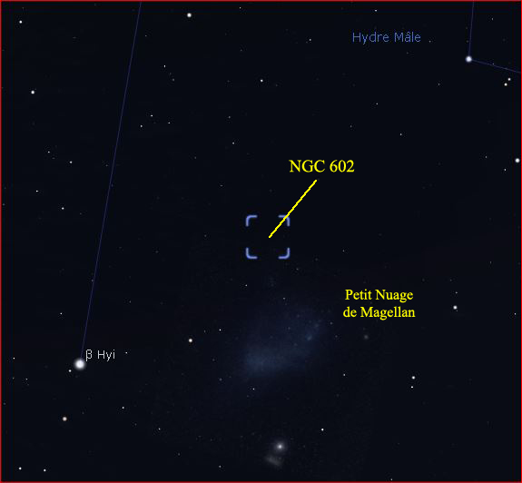 Image réalisée à l'aide du logiciel Stellarium.